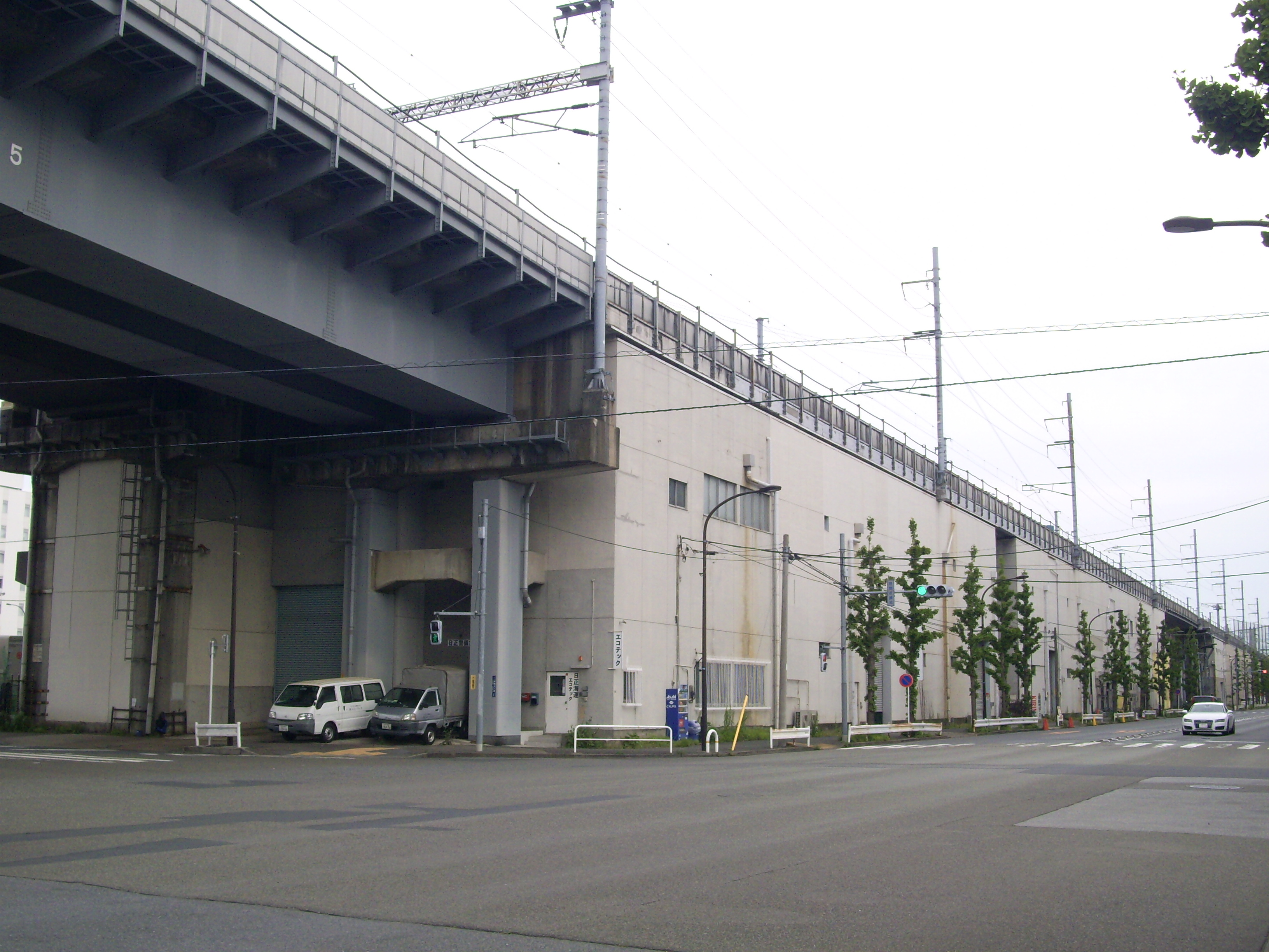 東海道新幹線大井車両基地引き込み線：高架下を倉庫利用する耐力壁構造 ㊟カメラを起動すると日付機能が出荷時のものに初期化されるため、ファイル履歴の撮影日時とメタデータの原画像データの生成日時が異なります